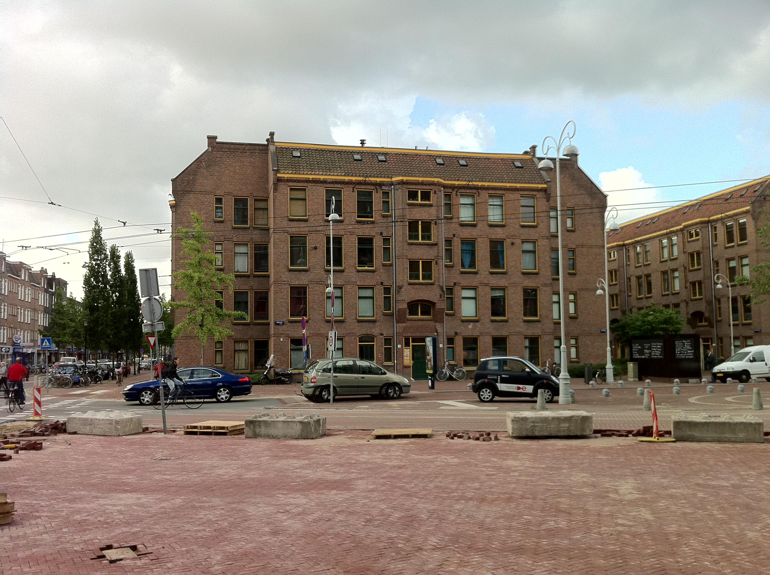 Blok 1 van Berlageblokken eigendom van woningcorporatie Ymere